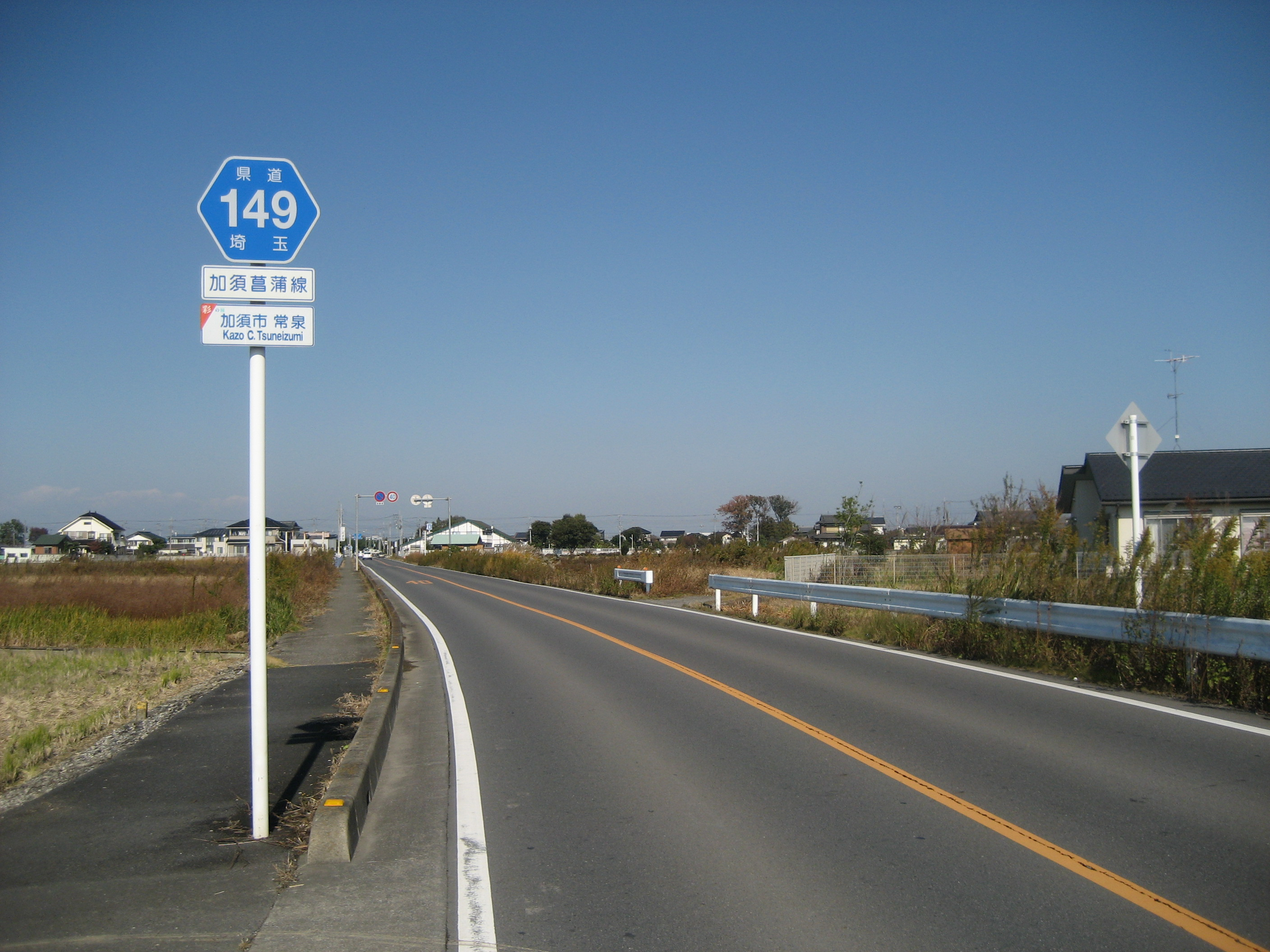 埼玉県道149号線加須市常泉付近